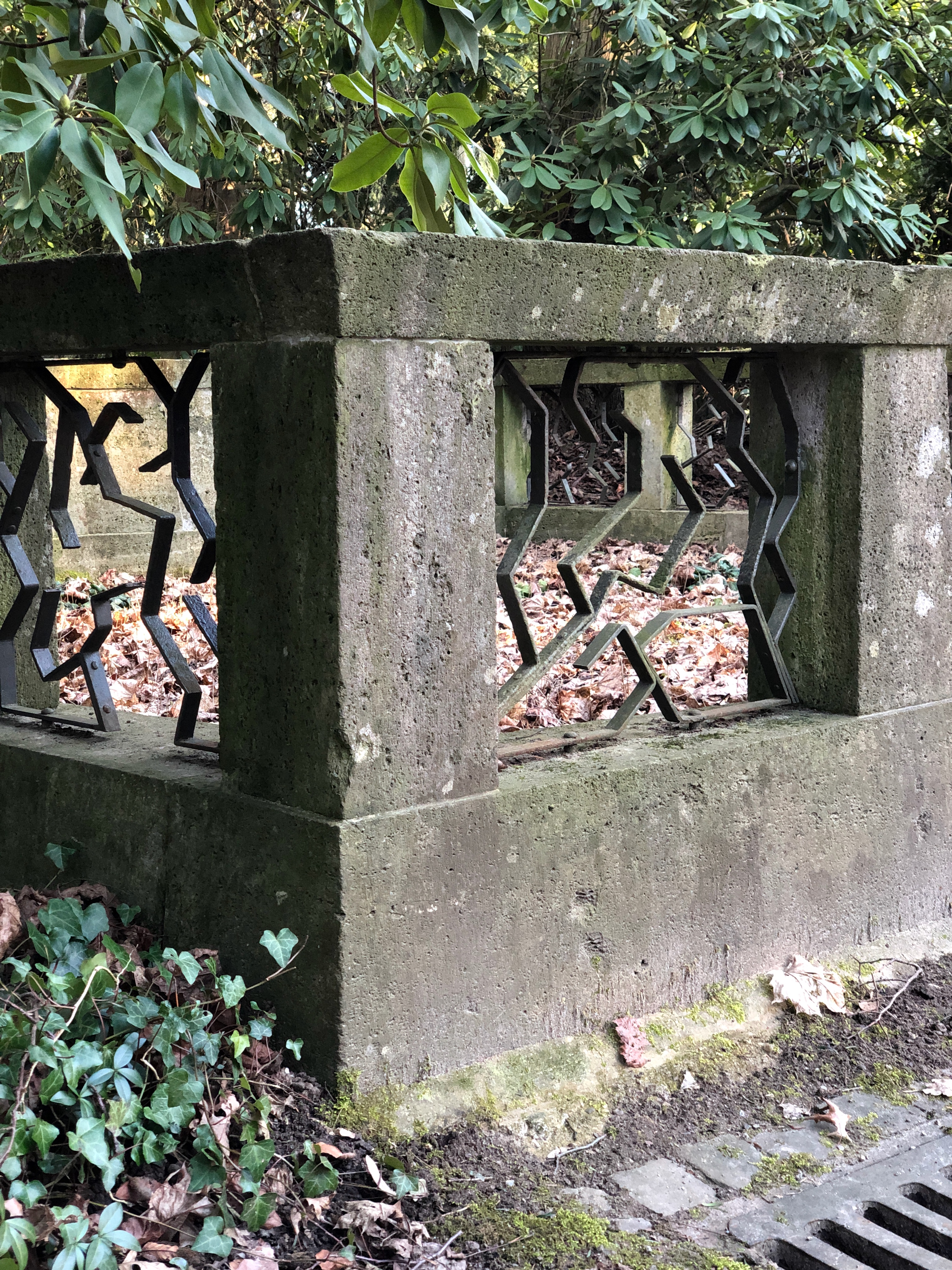 Grabmal der Familie Aschaffenburg auf dem Bunten Garten in Mönchengladbach. Entwurfen vom Architekten Otto Bartning.